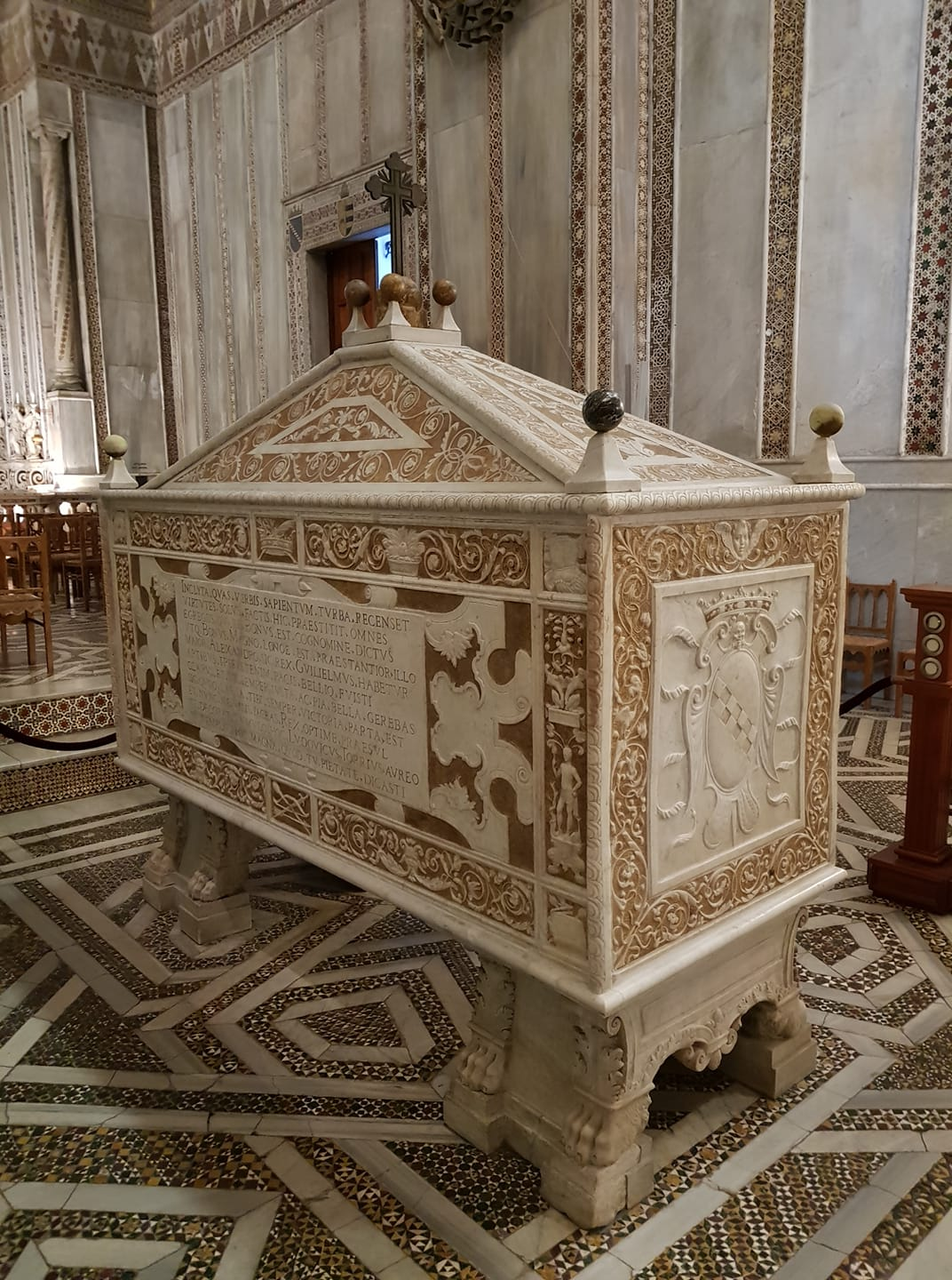 Sarkophag Wilhelms II. von Sizilien im Dom von Monreale